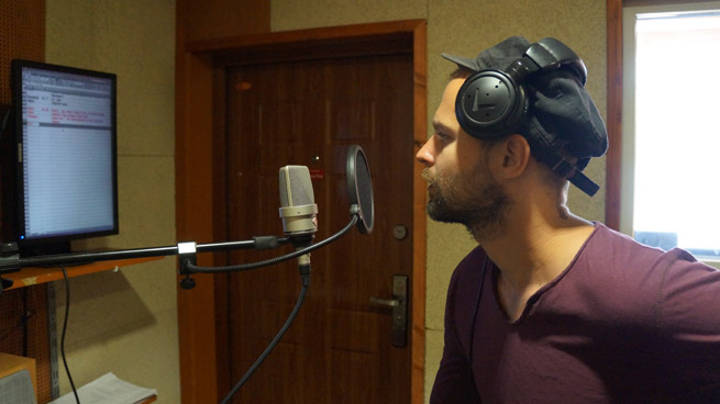 Horváth Illés szinkronizál a Masterfilm Digital szinkronstúdiójában 2017 júniusában (